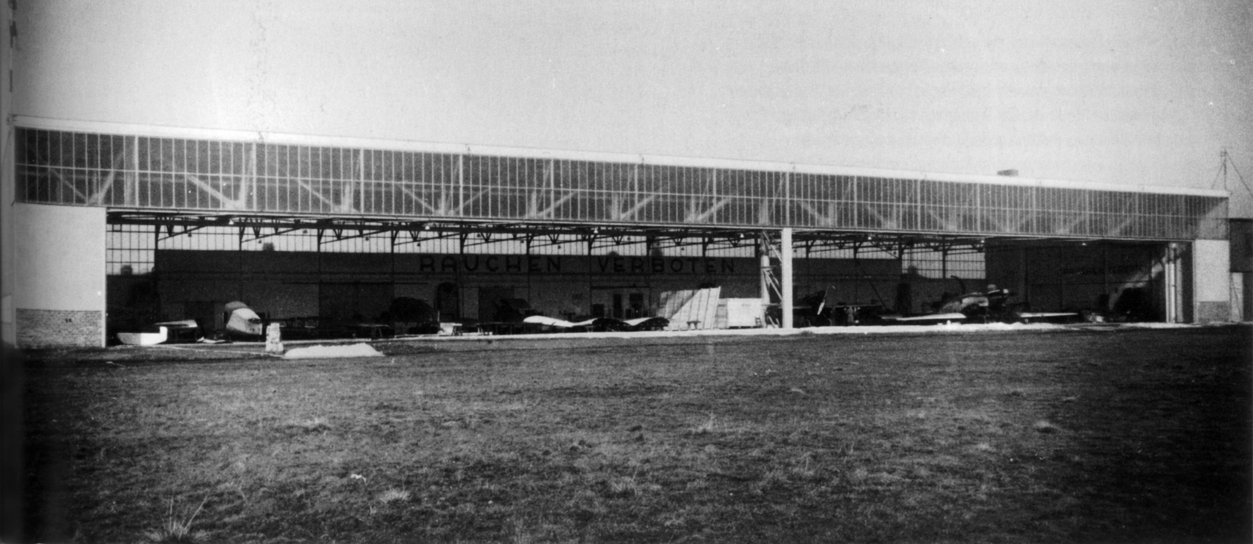 Flugzeughalle auf dem Flughafen Leipzig-Mockau (Halle III der Junkers-Flugzeugwerft, erbaut 1928/29)